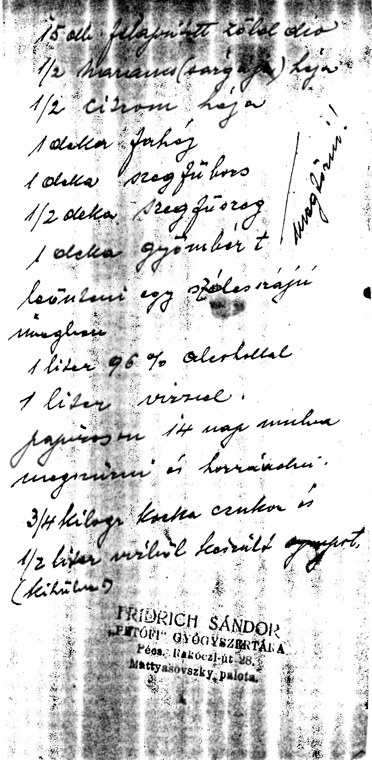 A Fridrich-féle zölddió-pálinka receptje, rajta a Petőfi Gyógyszertár pecsétje (Pécs, Petőfi Gyógyszertár)